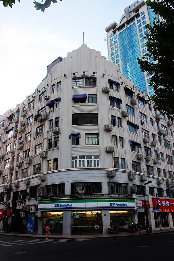 中文（中国大陆）: 四川北路85号，大桥大楼正立面